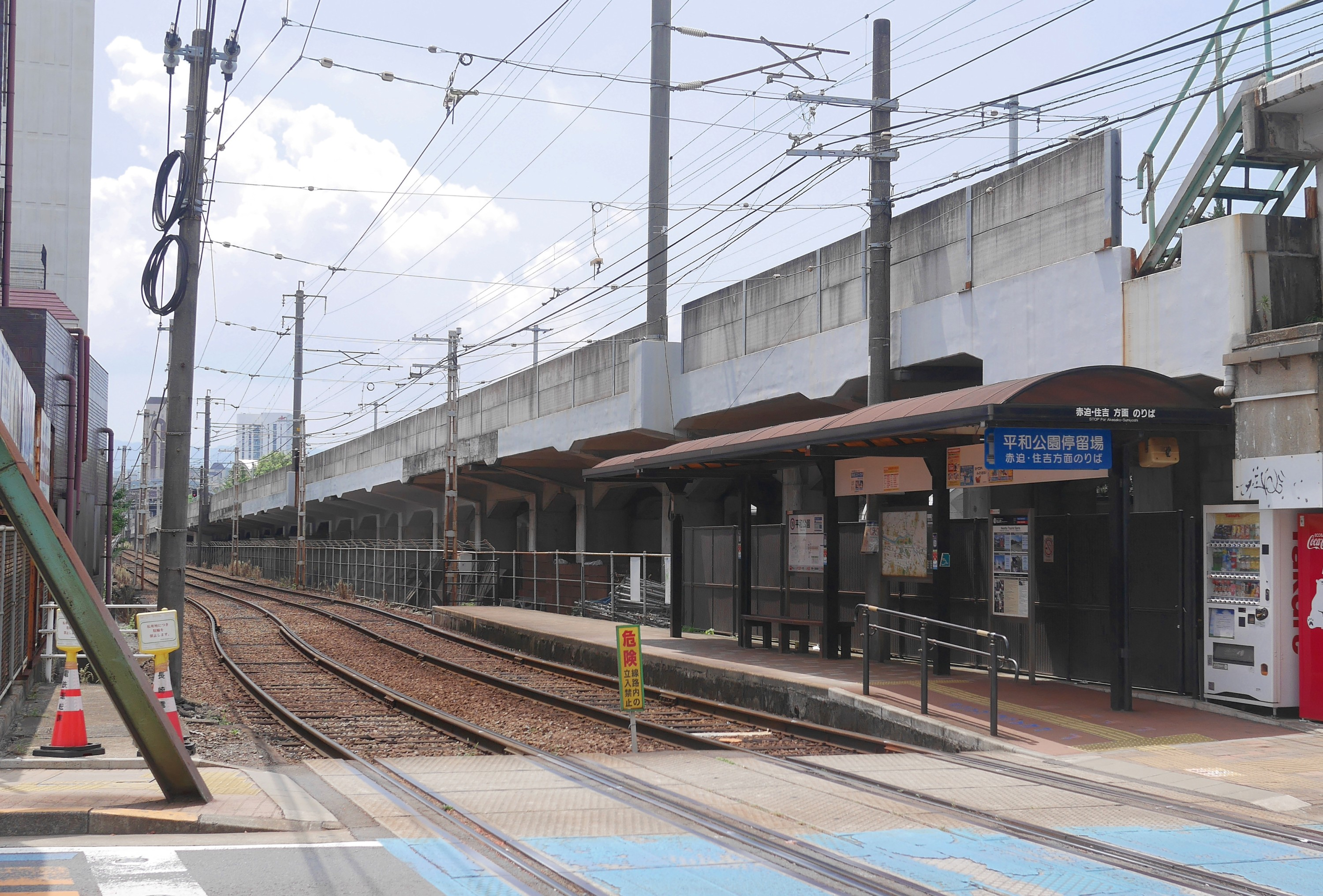 長崎電気軌道の平和公園停留場、赤迫・住吉方面のりば（長崎県長崎市）。2018年8月に松山町から改称された。